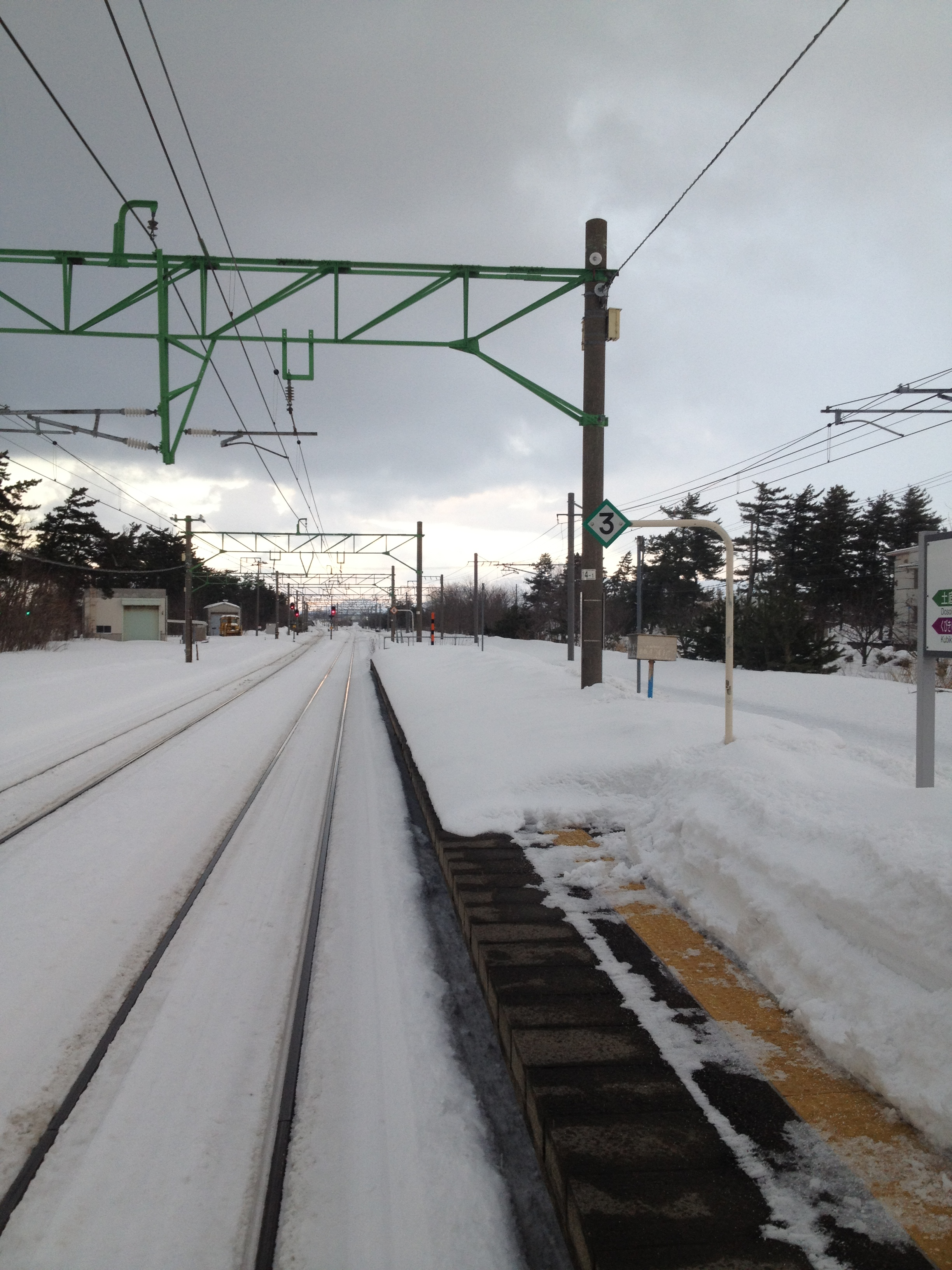 2番線より